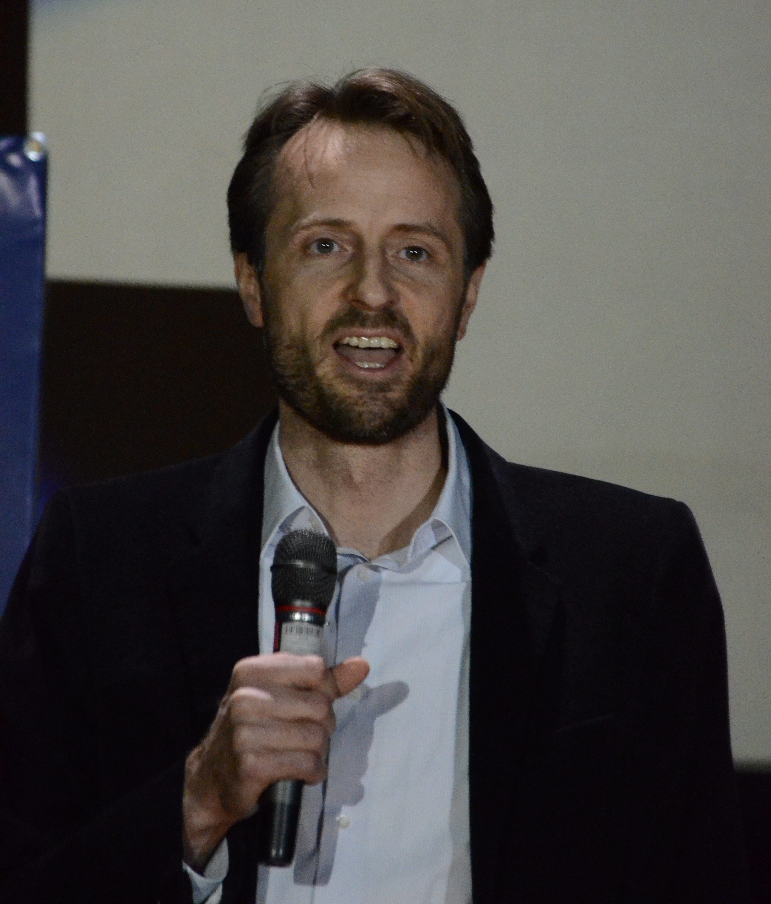 Фестиваль документального кіно "Docudays" (21 березня 2014 року, відкриття. Виступає Андреас фон Бекерат